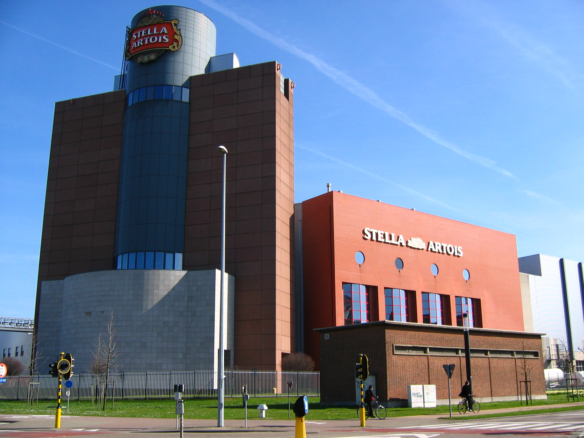 Stella Artois brewery in Leuven, Belgium.